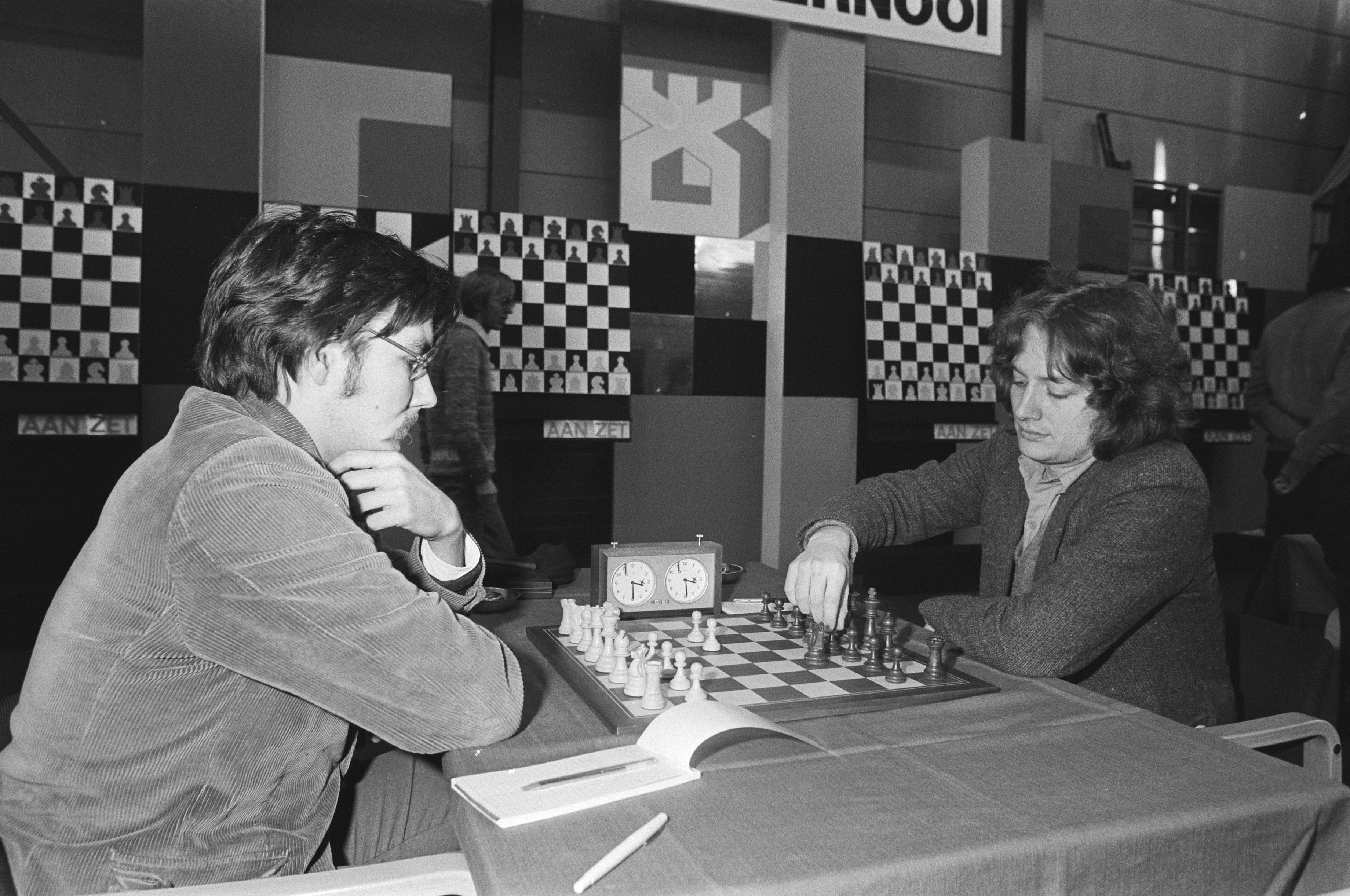 Collectie / Archief : Fotocollectie Anefo Reportage / Serie : [ onbekend ] Beschrijving : Eerste ronde Hoogovens Schaaktoernooi in Wijk aan Zee . Jan Timman (r.) tegen Larry Christiansen (l.) Datum : 15 januari 1982 Locatie : Noord-Holland, Wijk aan Zee Trefwoorden : schaken, toernooien Persoonsnaam : Timman, Jan Fotograaf : Dijk, Hans van / Anefo Auteursrechthebbende : Nationaal Archief Materiaalsoort : Negatief (zwart/wit) Nummer archiefinventaris : bekijk toegang 2.24.01.05 Bestanddeelnummer : 931-9140